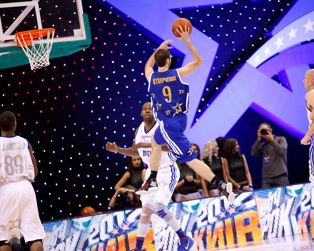 Матч всех звезд баскетбольной Суперлиги 2012. Киев. Ukrainian All-star